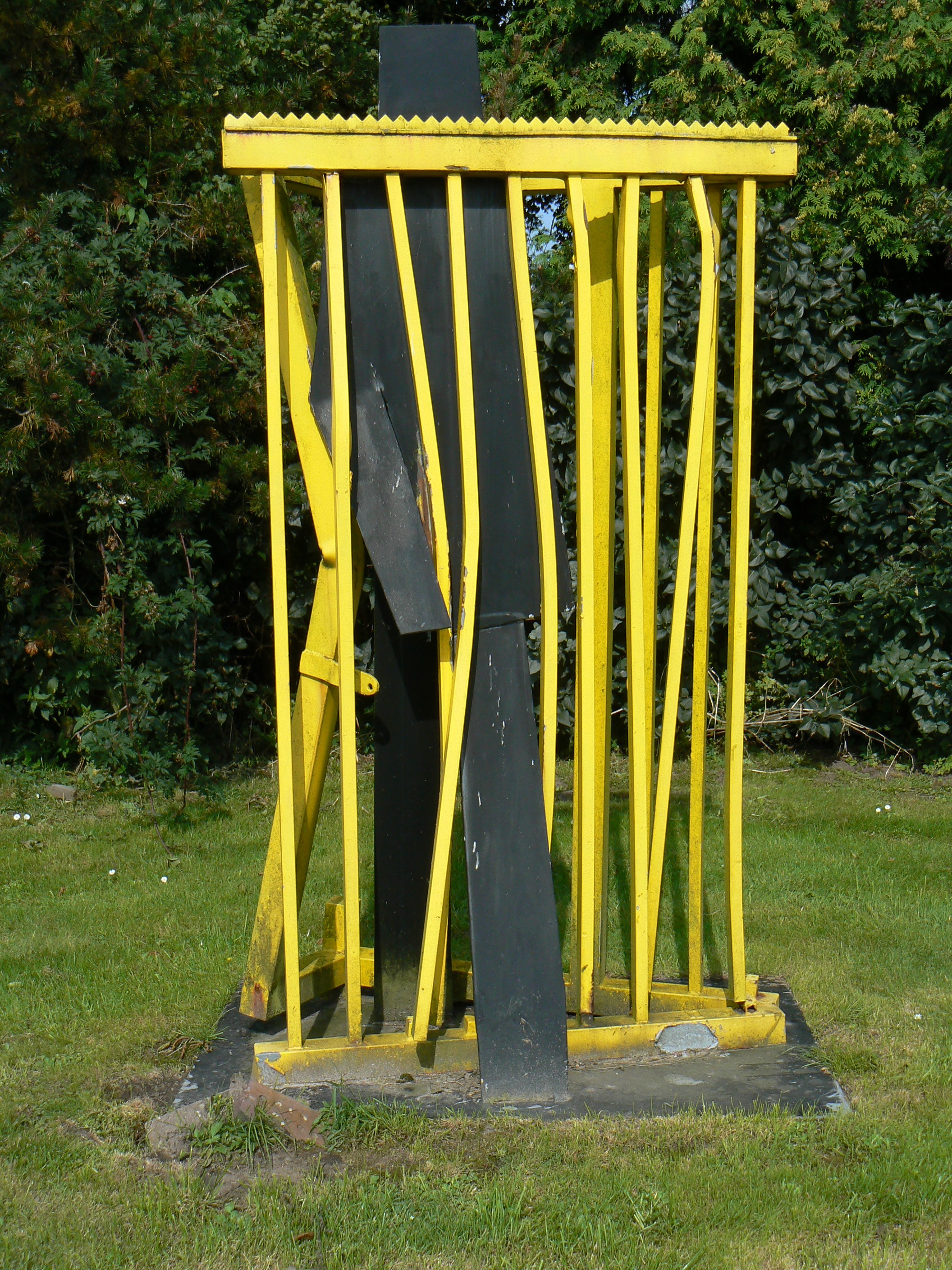 sculpture "Mann im Tor" (1990) by Wolfram Schneider in Wittmund/Germany